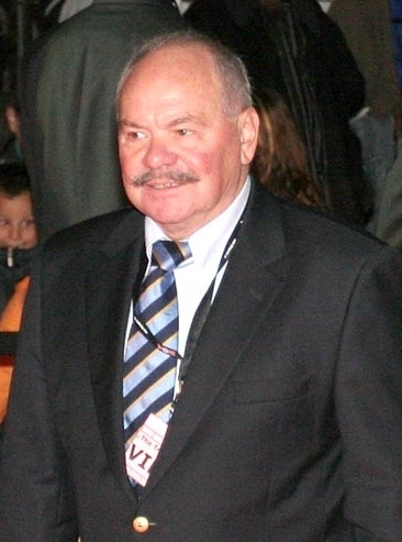 Klaus Schlappner im September 2006, Hans-Dieter Niepötter, für bessere Auflösung Anfrage an , for higher resolution please